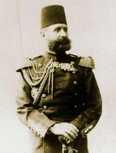 Bodo-Borries von Ditfurth, 26. Dez. 1852 Bielefeld - 21. Feb. 1915 Koeln, 1901-1910 Pascha, General + Fluegeladjutant Sultans Abduelhamid II